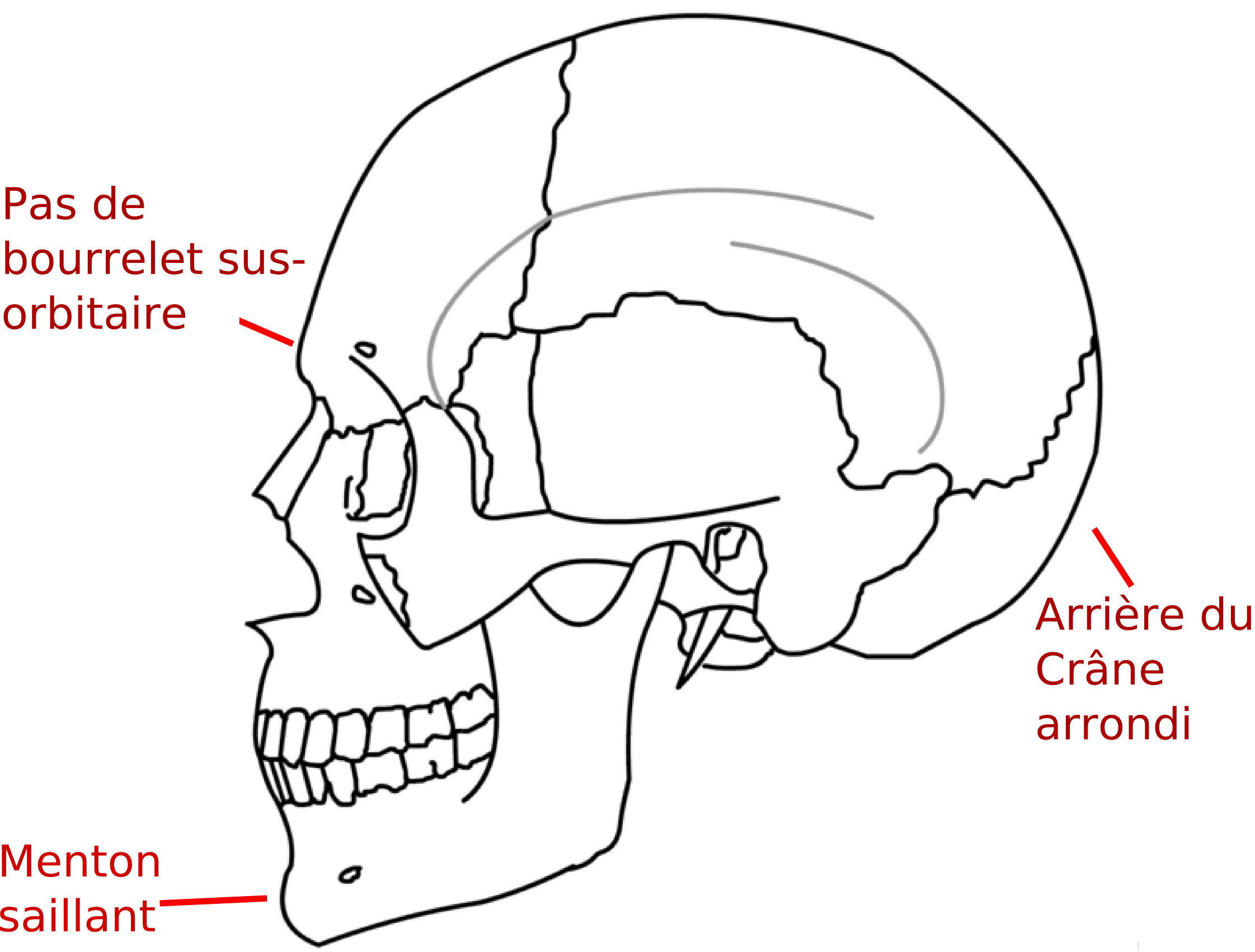 Crane humain et légende (francais)